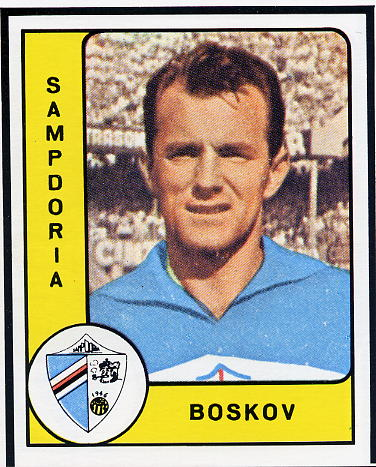 Vujadin Boškov che indossa la maglia del Sampdoria